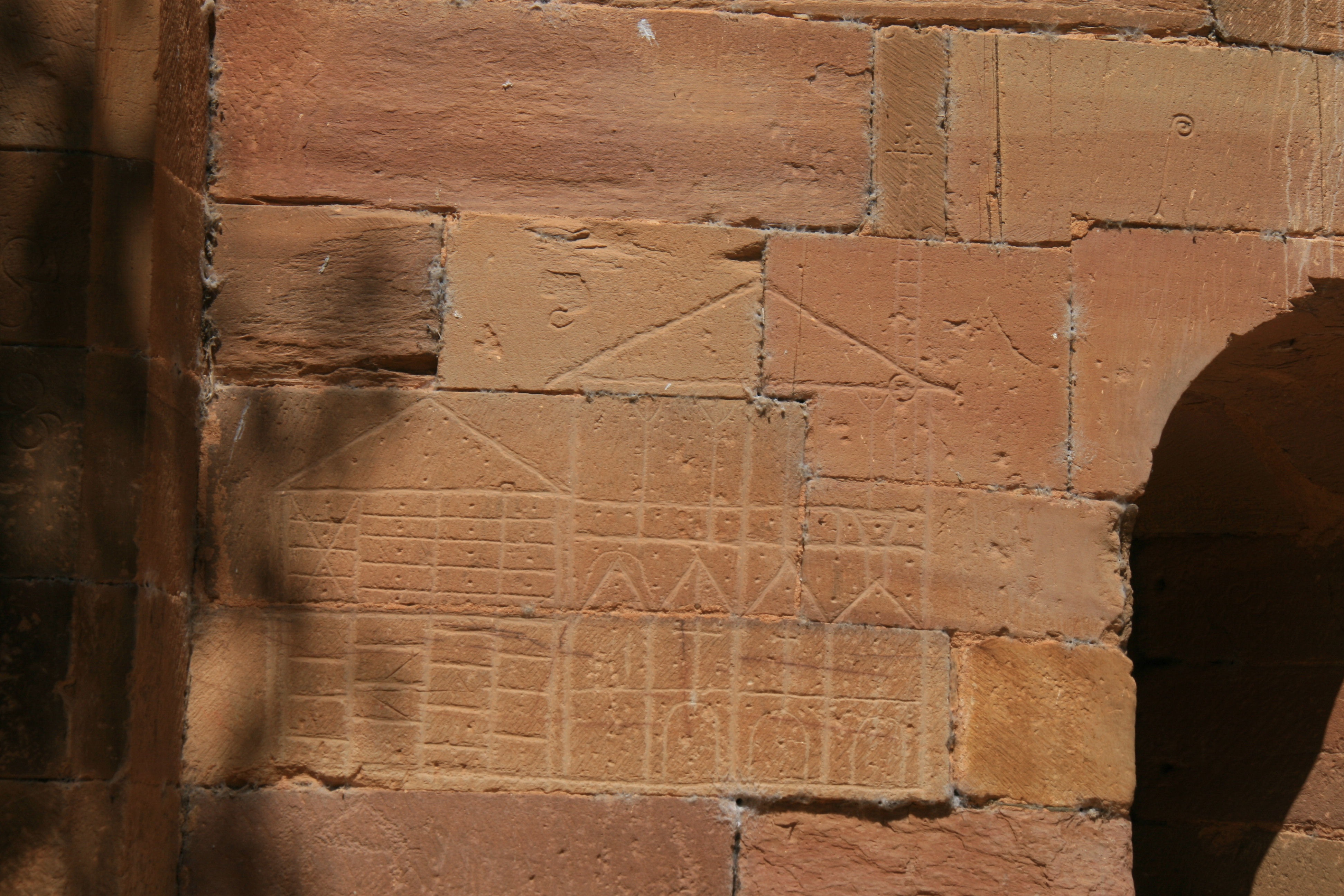 Plano del constructor - Monasterio de Santa María de Moreruela